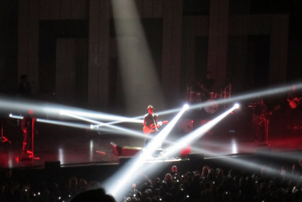 Bruno Mars Concert